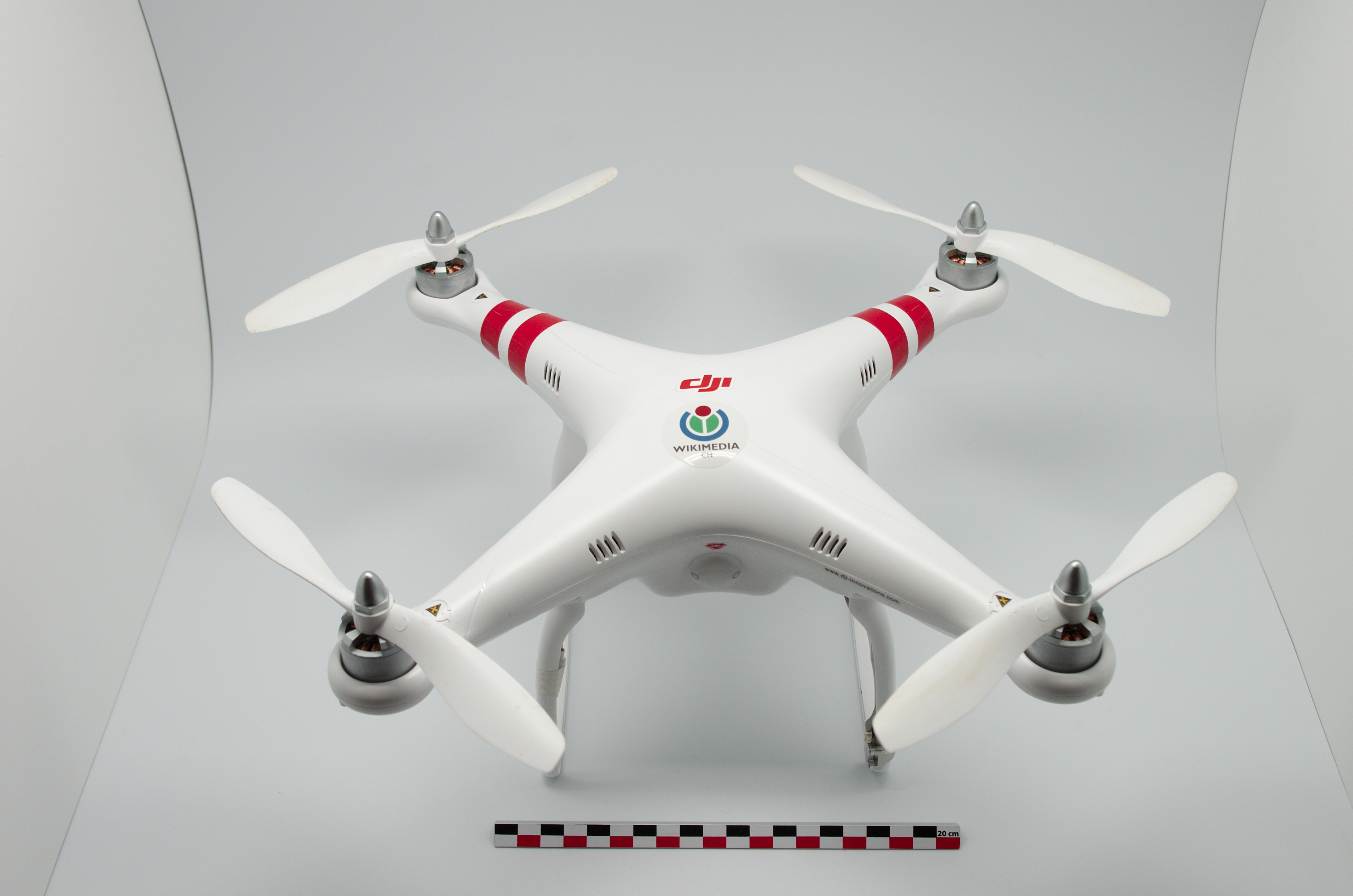 WMCH Drone - Echelle